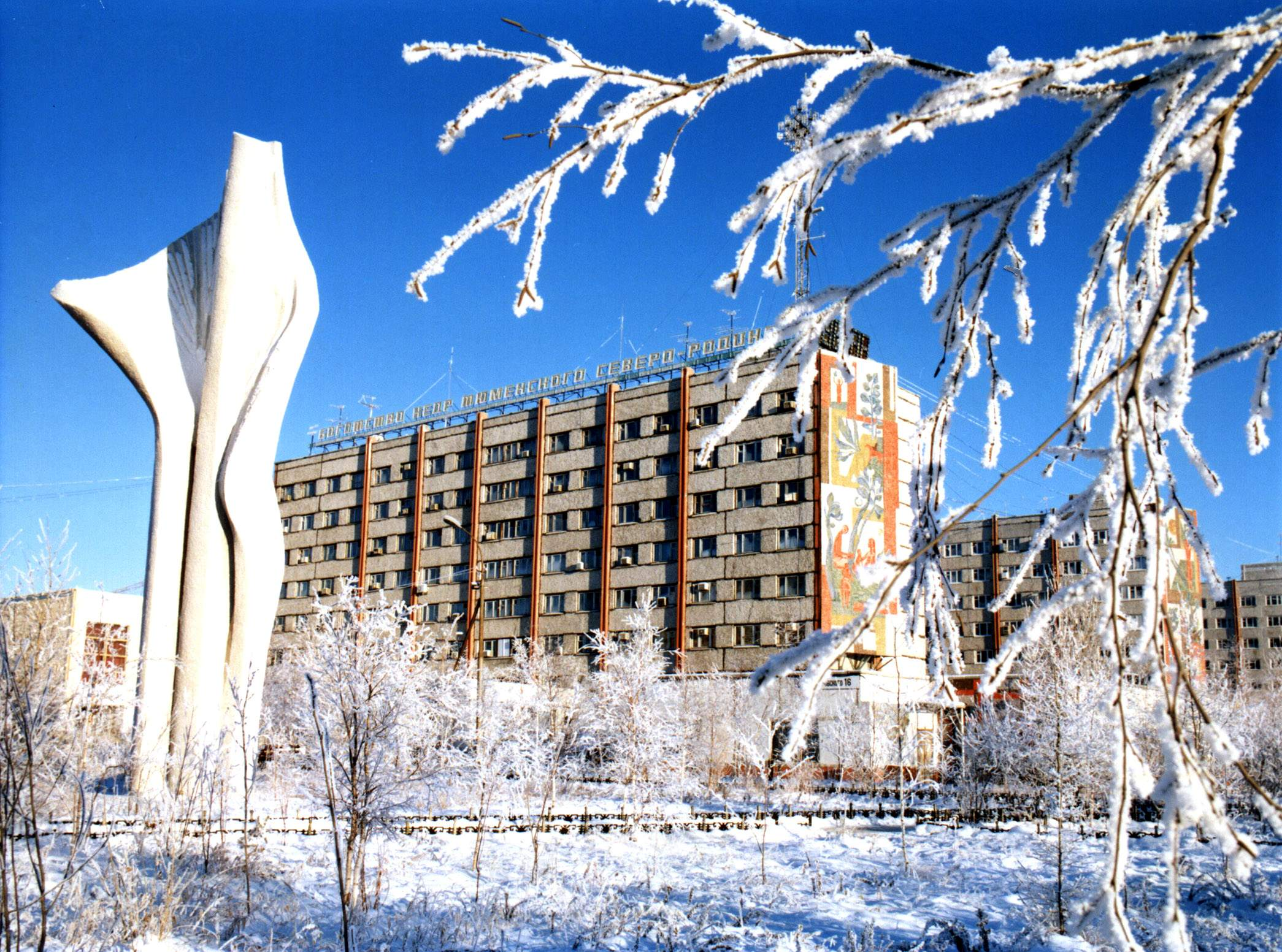 Winter